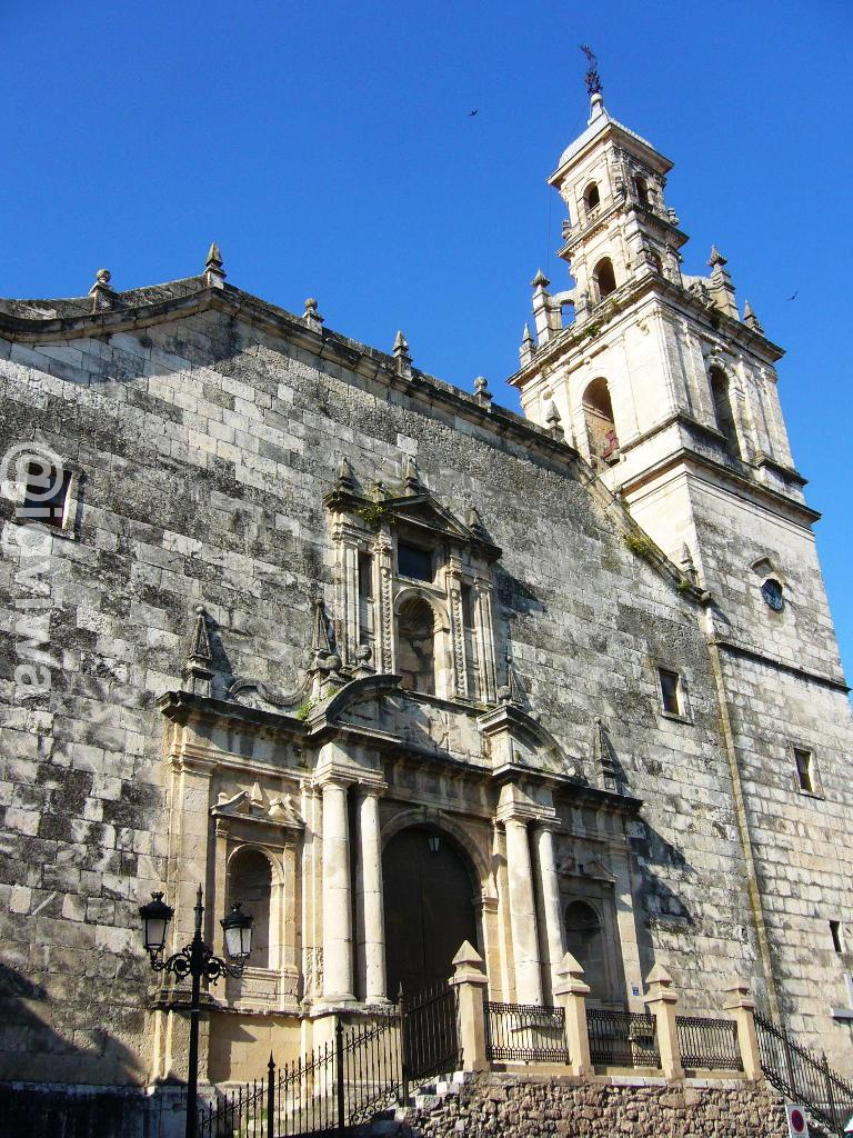 Església parroquial de Sant Miquel Arcàngel, a Énguera.